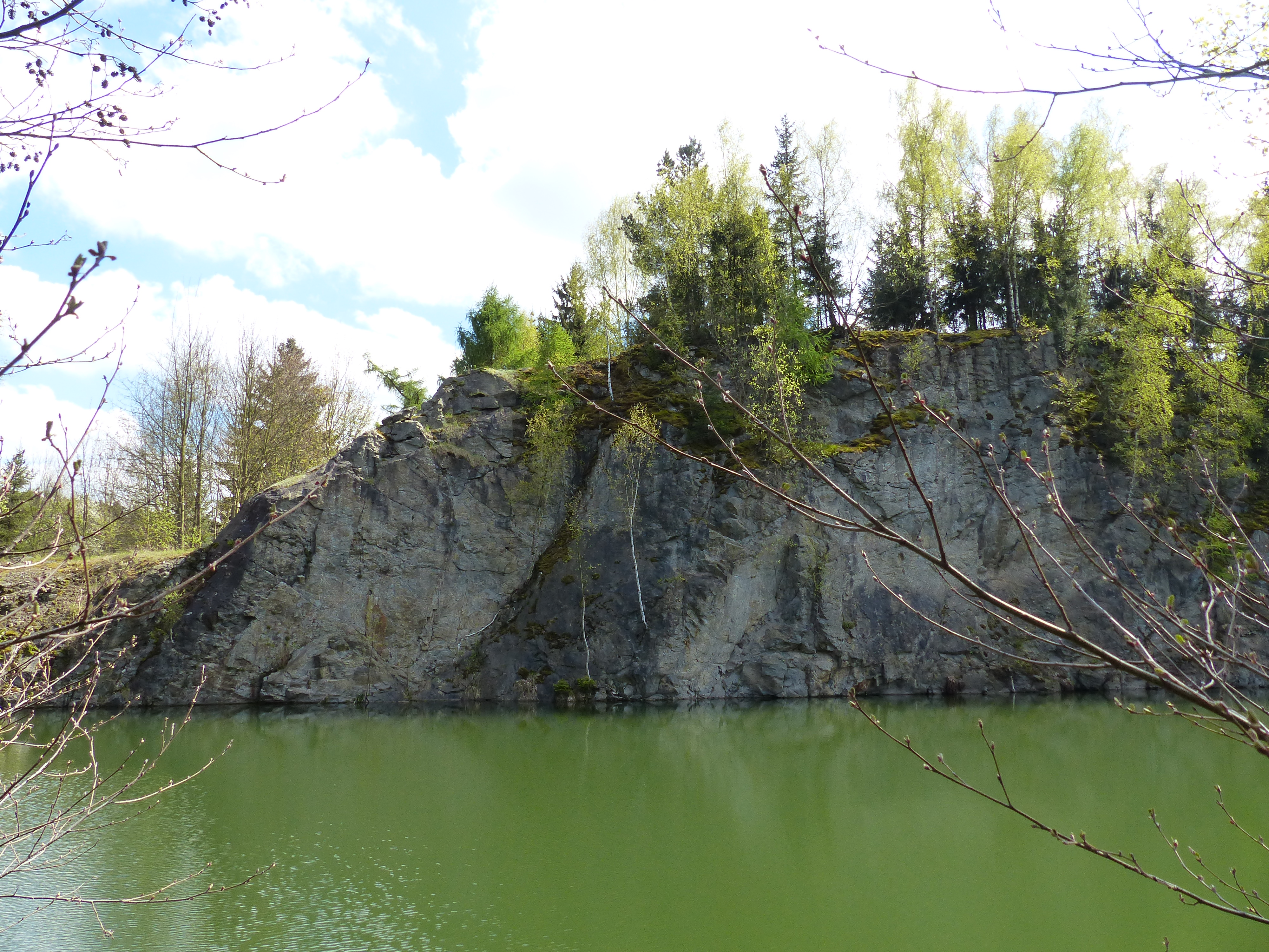 Flaserkalkbruch Trogenau, Geotop 475A026